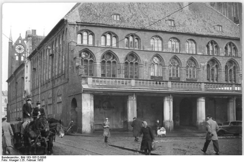 Stralsund, Rathaus, Pferdefuhrwerk Zentralbild Krueger 25.3.1953 Stadtansicht von Stralsund UBz: Das Rathaus Information added by Wikimedia users.Das Bild zeigt das Stralsunder Rathaus.